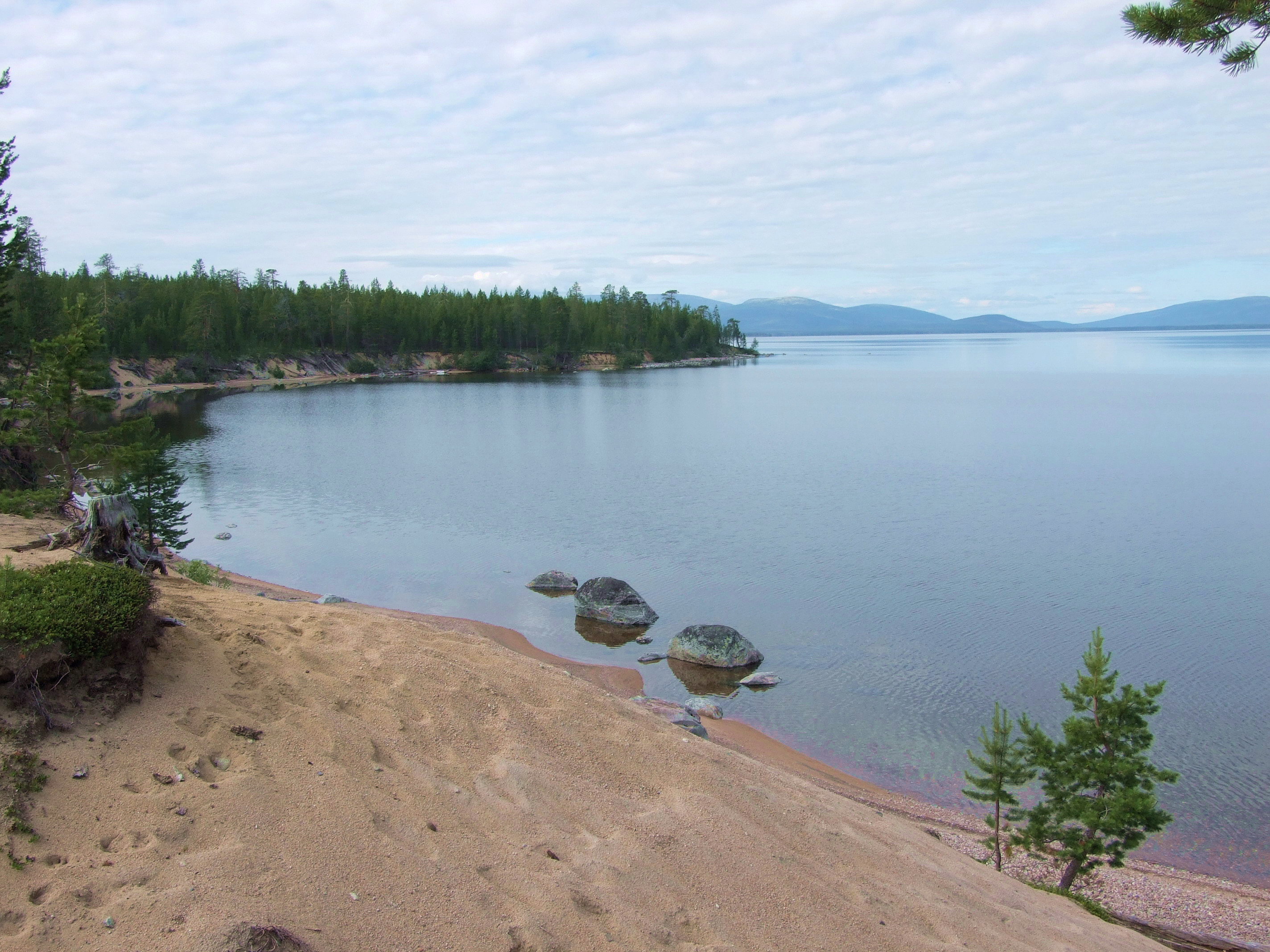 Колвицкое_озеро